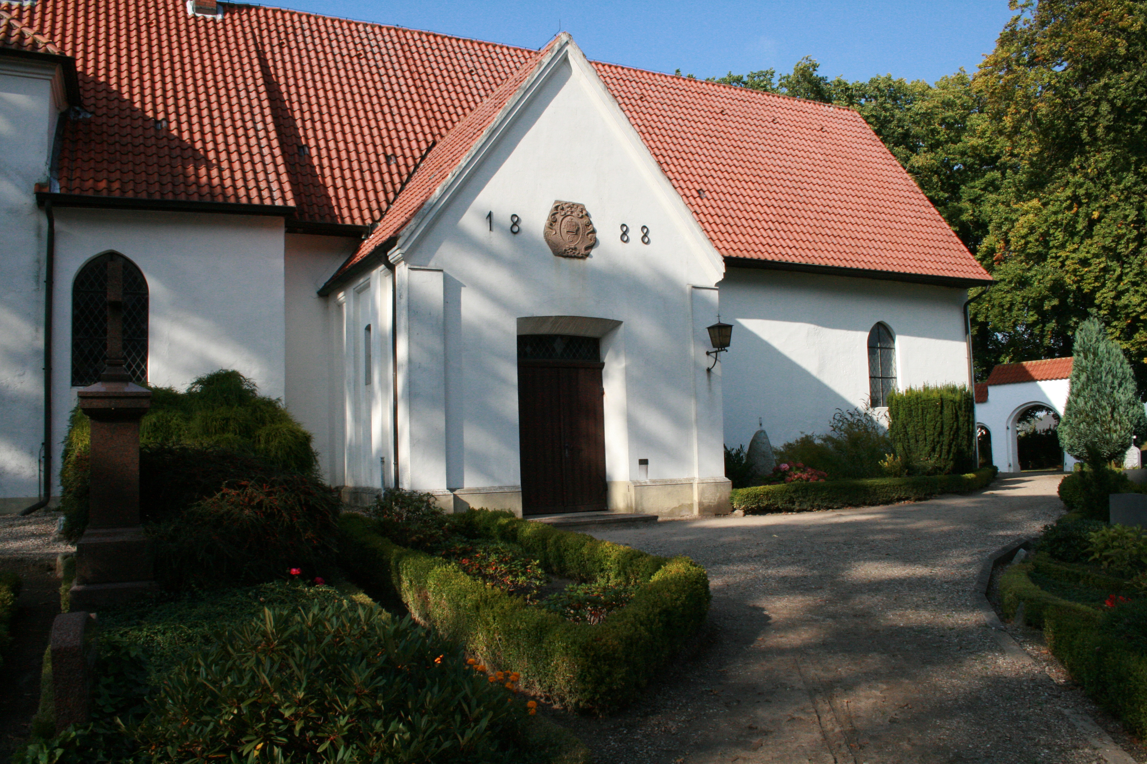 Wilhadikirche in Ulsnis Haupteingang